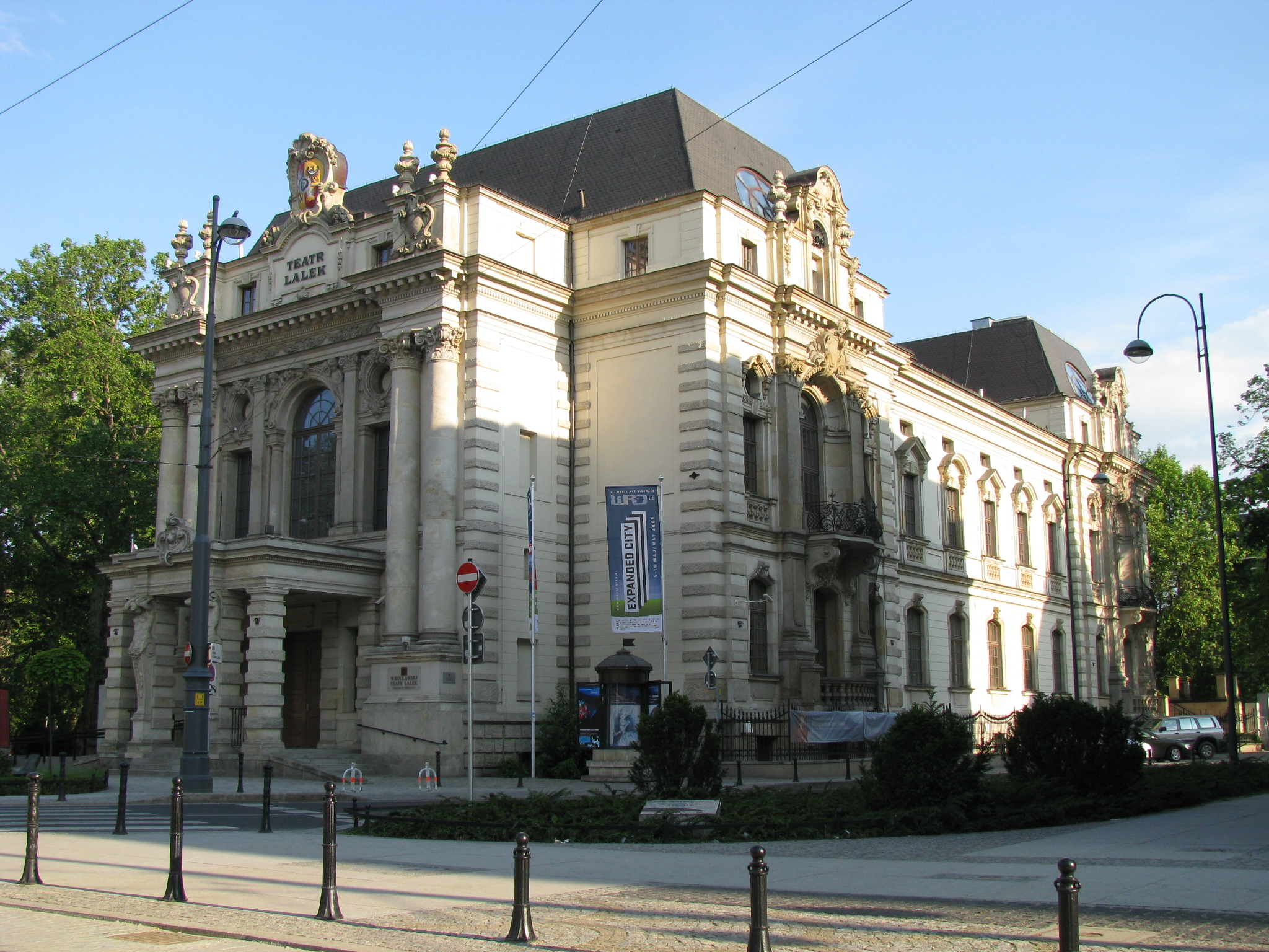 Teatr Lalek we Wrocławiu